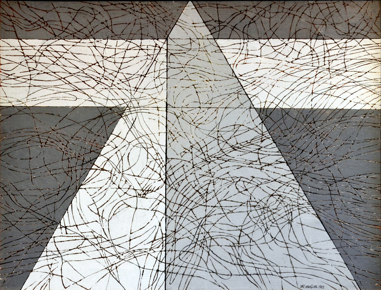 Jiří Mrázek, Šedá pyramida, olej, plátno, 50x65,5 cm, 1982, Museum Kampa